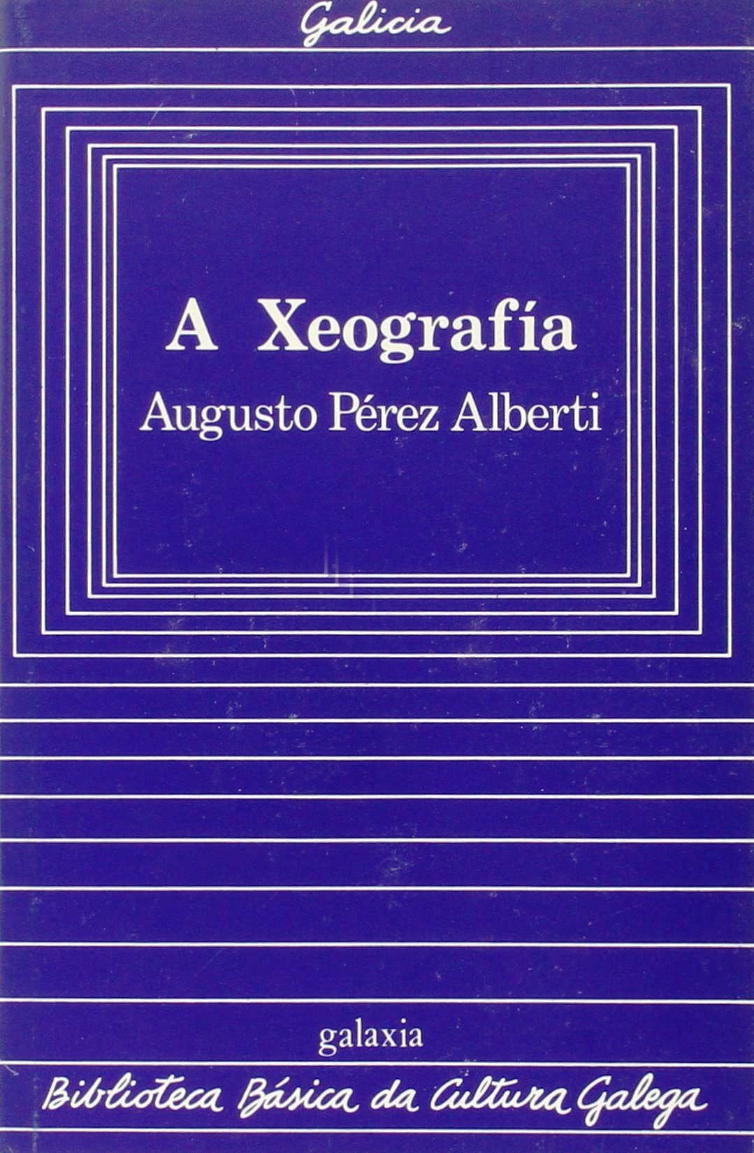 Biblioteca Básica da Cultura Galega, 01, A Xeografía, Augusto Pérez Alberti.jpg